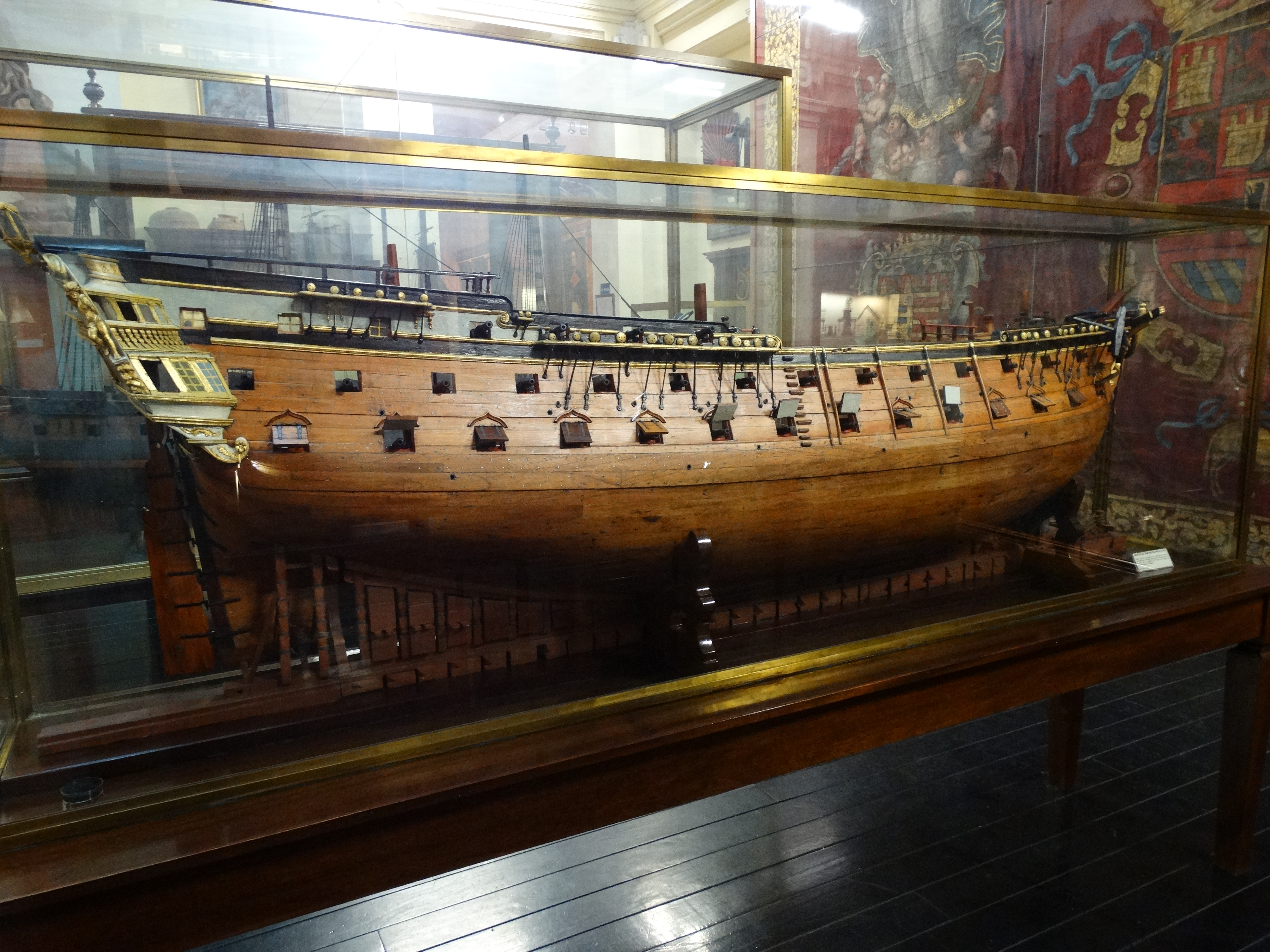 Museo Naval de Madrid, España. Navío de 68 cañones en grada (1782). Medio modelo construido por Jerónimo Cifre para los alumnos de la Academia de Pilotos de Marina del Departamento de Cartagena.